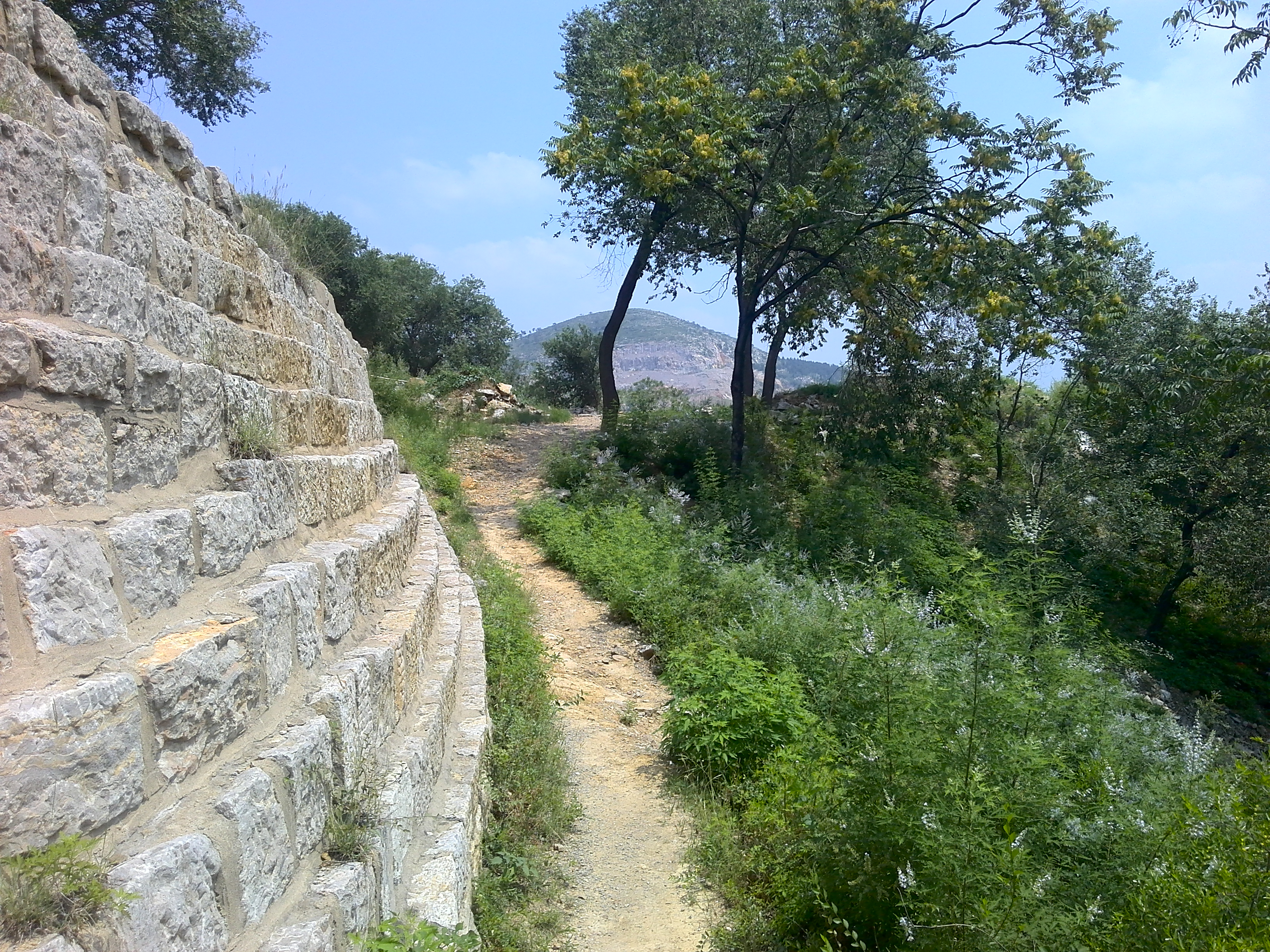 青峰山山脚胜利渠附近